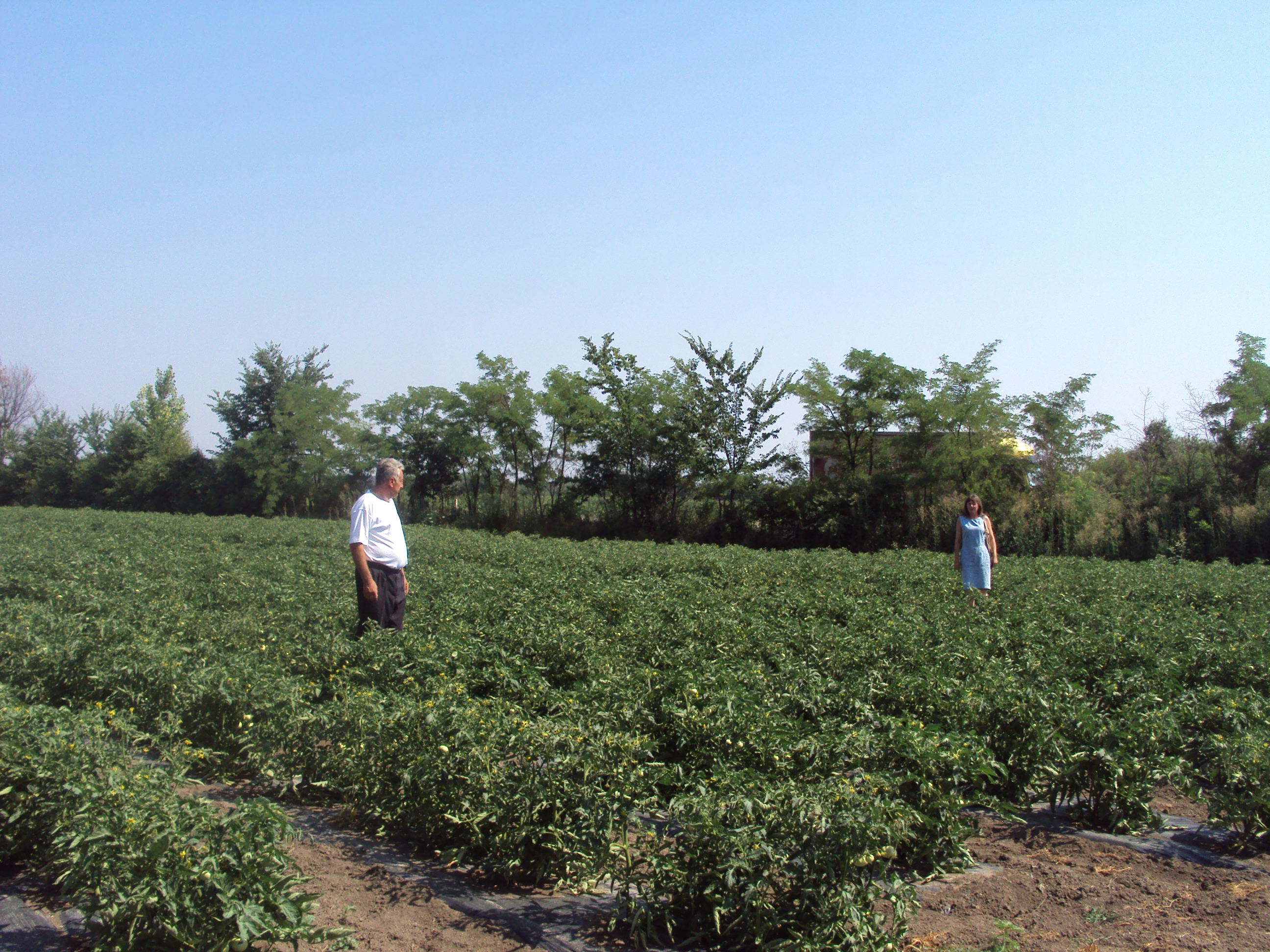 Поље